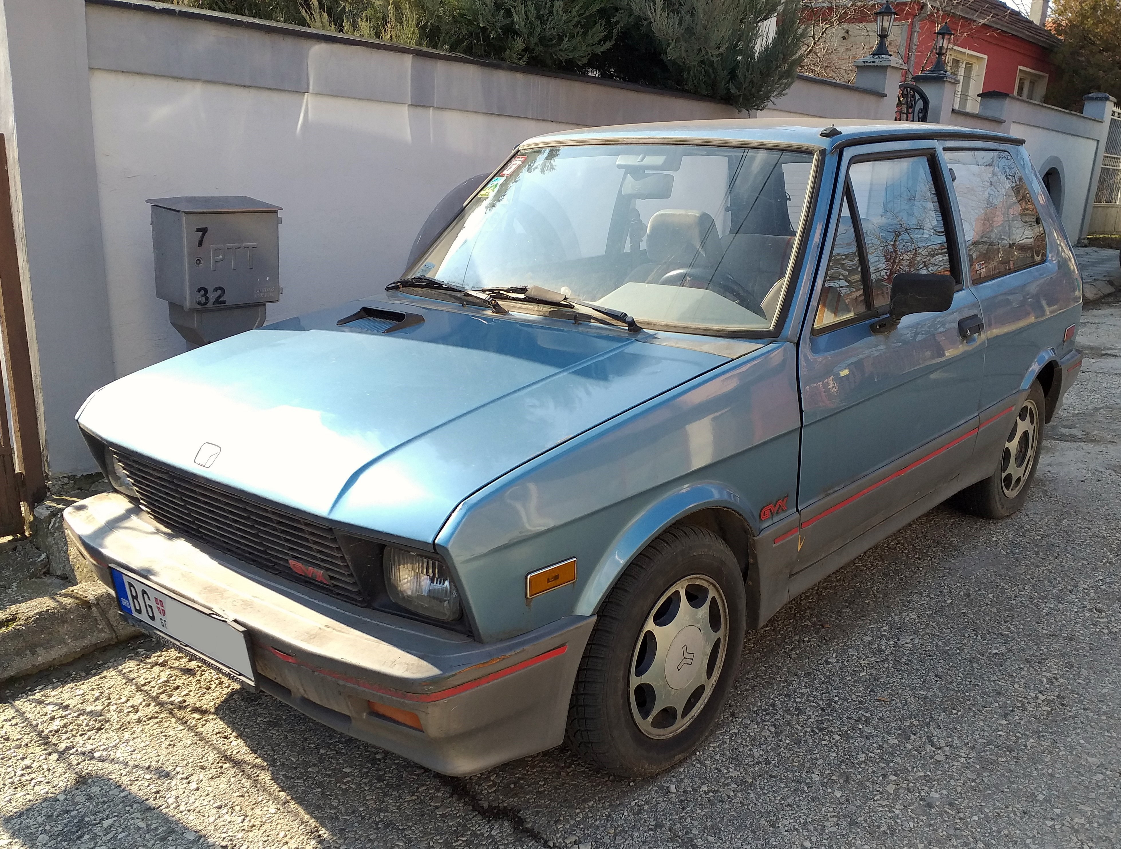 Srpski (latinica): Југо GVX са каталитичким конвертором.